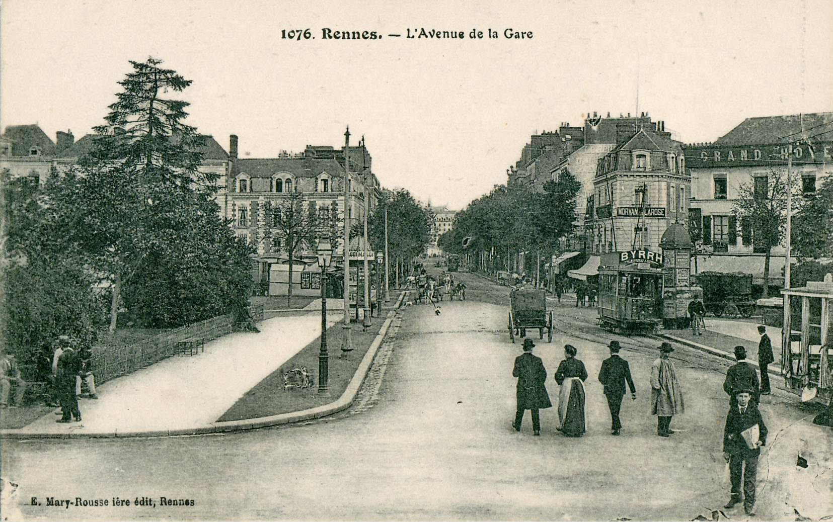 Carte postale ancienne éditée par Mary-Rousselière à Rennes, n°1076Rennes L'Avenue de la GareVue d'un tramway à son évitement.